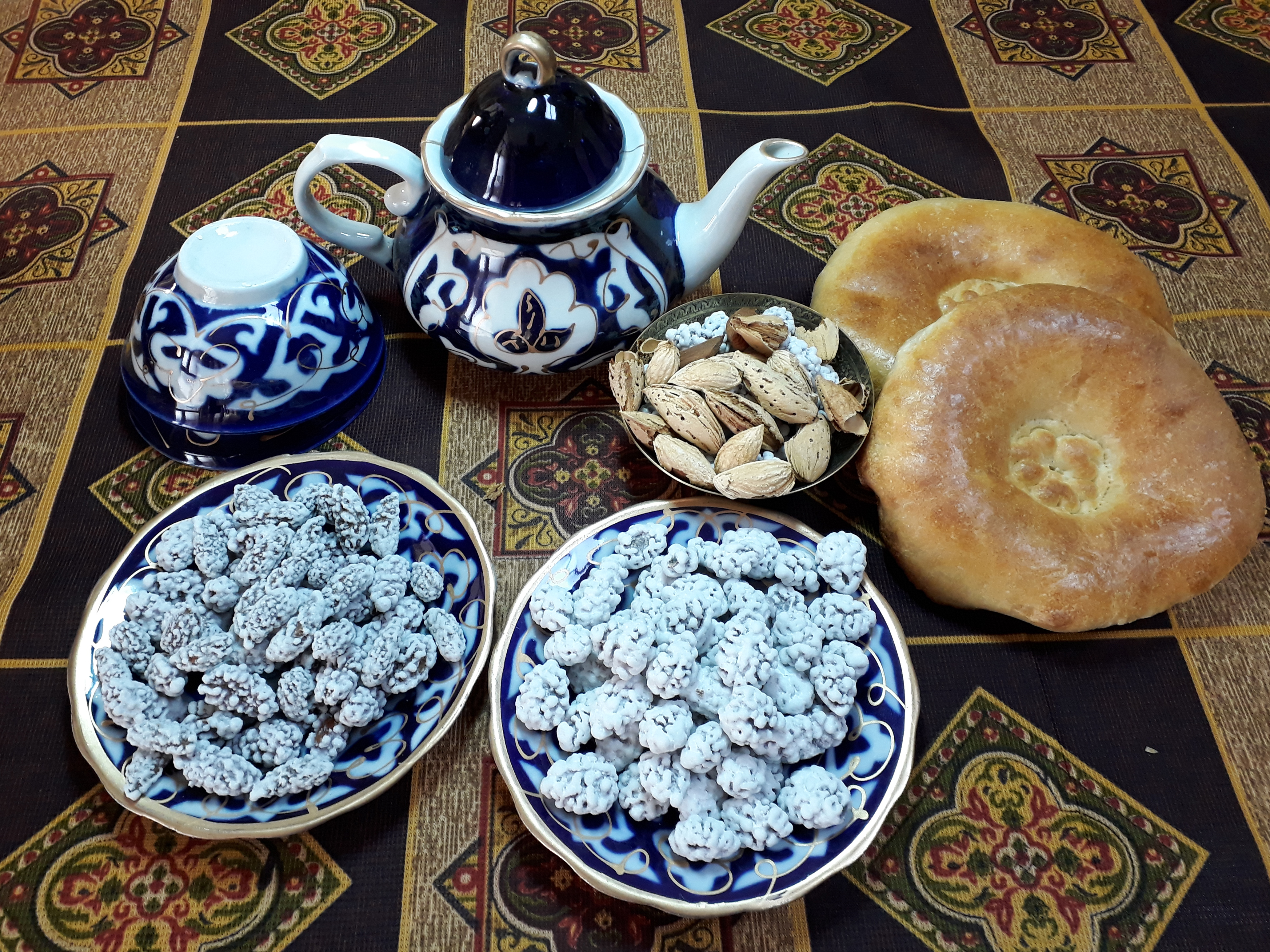 Тоҷикӣ: Бодомқандак бо чой ва кулчаҳори равғанин